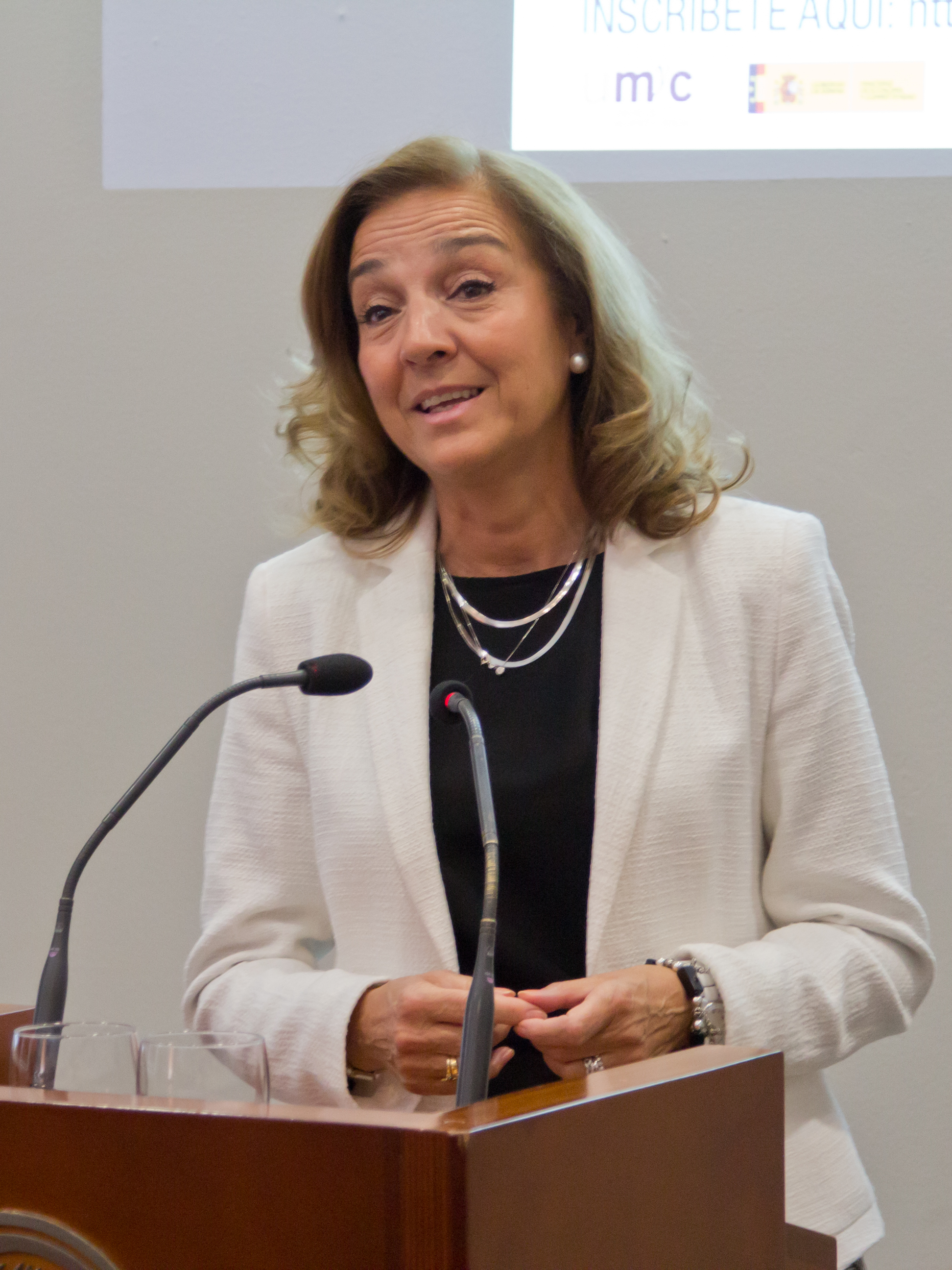 Carmen Vela, secretaria de Estado de Investigación, Desarrollo e Innovación. Editatón por la visibilidad de las científicas en Wikipedia 2015, Residencia de Estudiantes, Madrid, España.